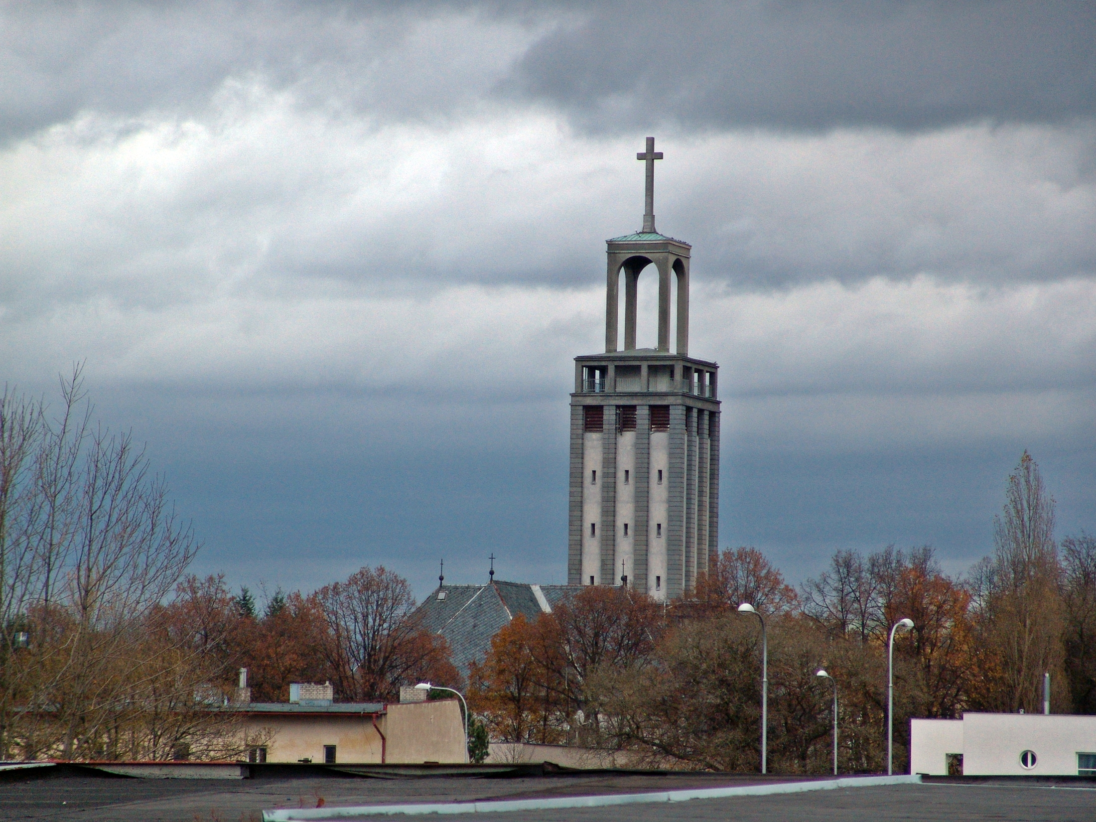 Kostel svaté Hedviky, náměstí Svaté Hedviky, Opava-Předměstí, Opava.